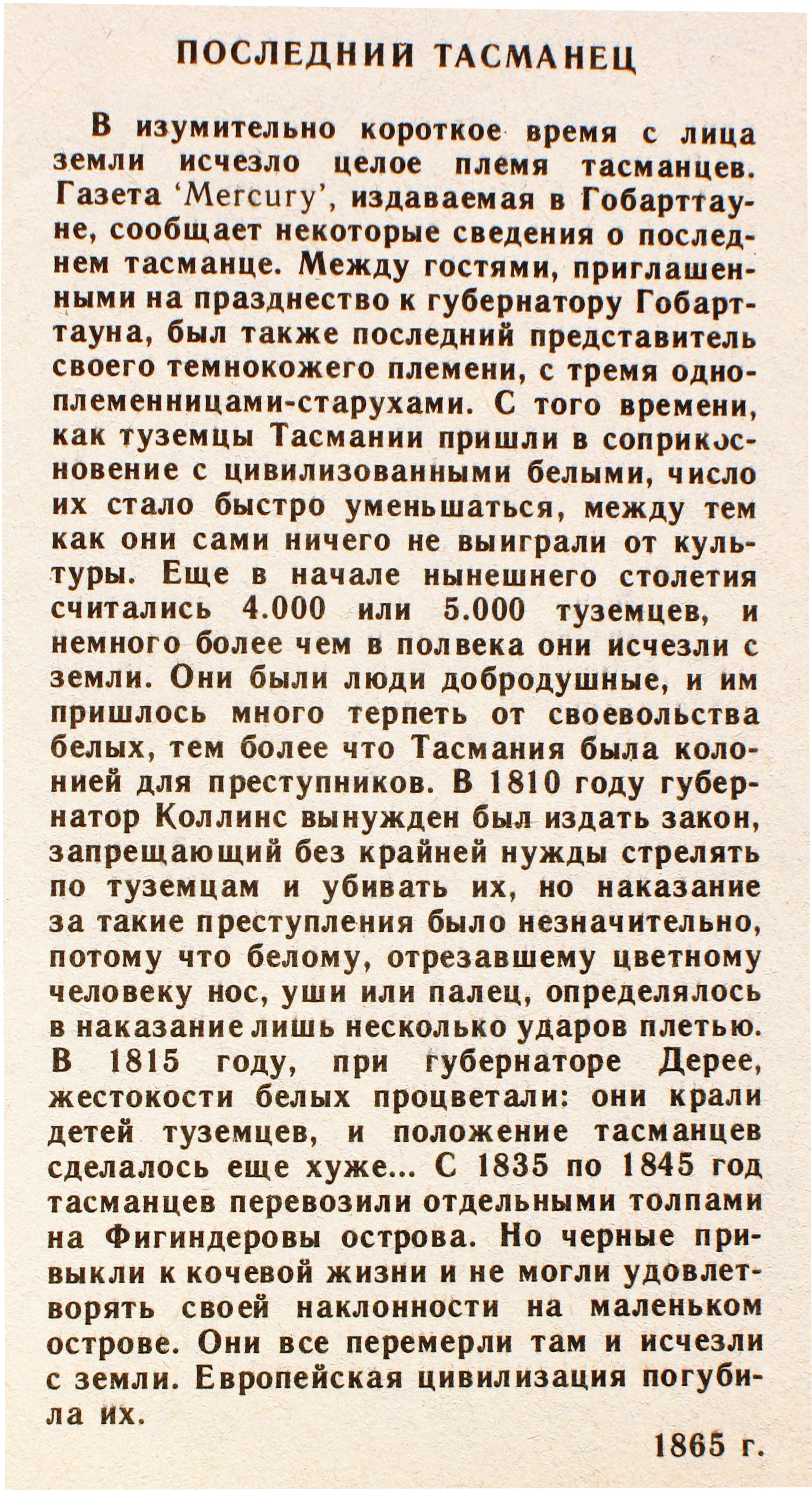 The last tasman. "Vokrug Sveta" magazine (Russia), 1865.